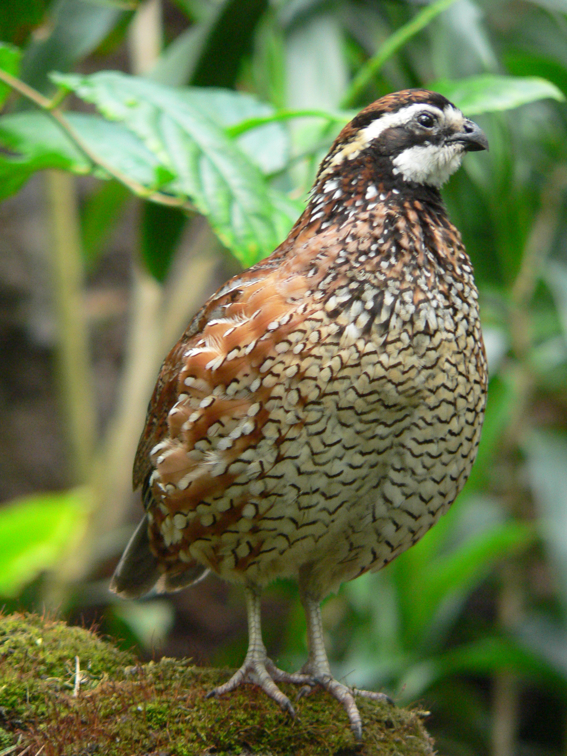 Virginia Wachtel